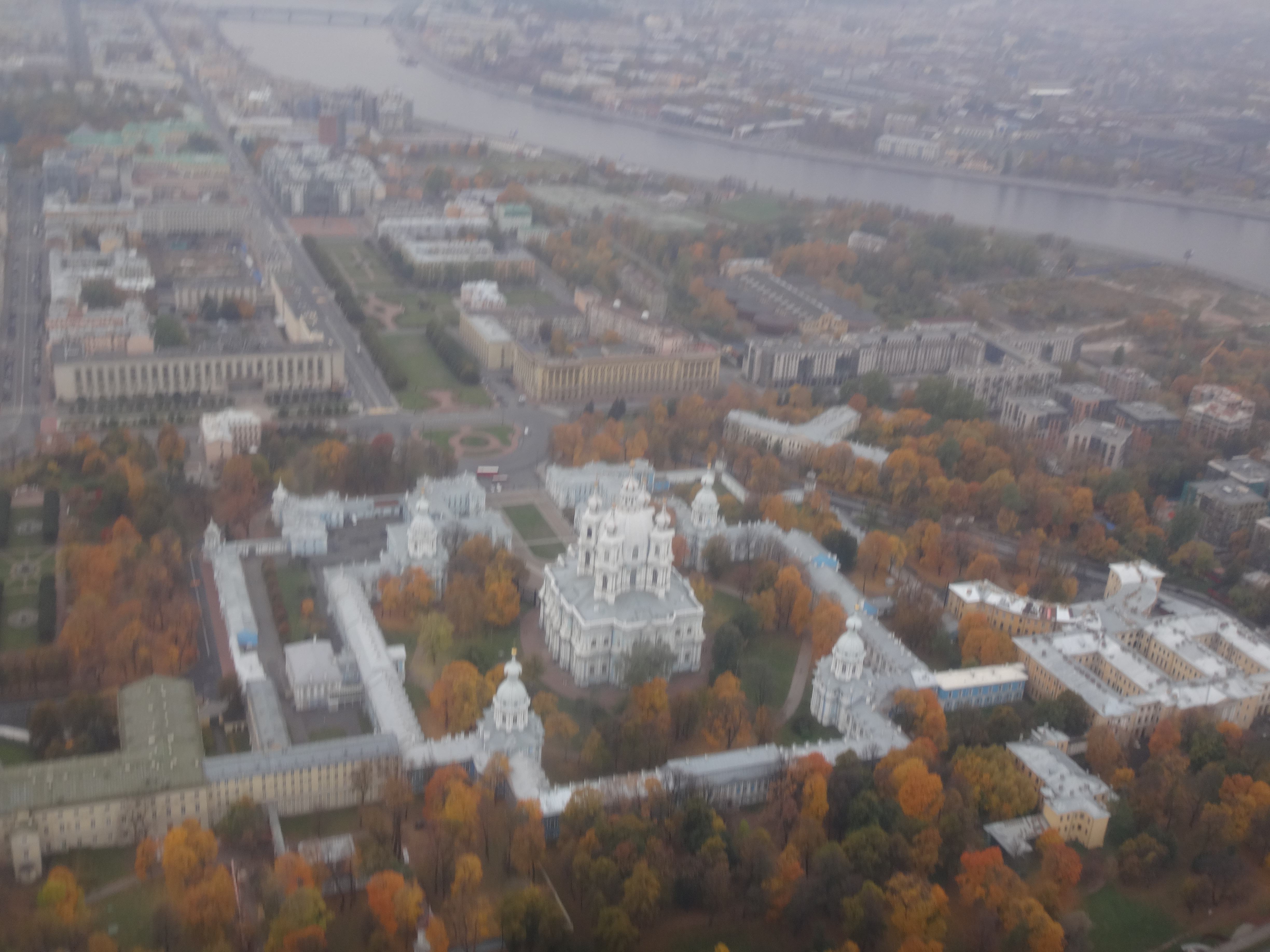 Смольный монастырь с вертушки